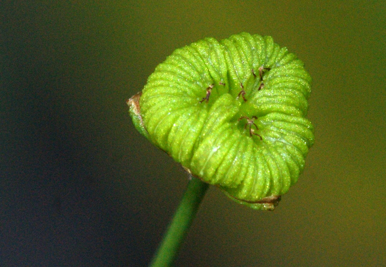 Alisma plantago-aquatica fruit Alisma plantago-aquatica DSC07967